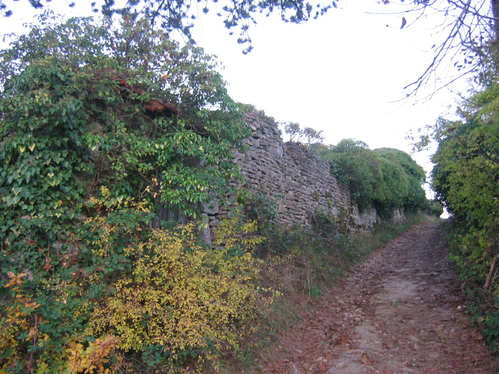 les murs